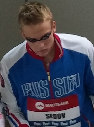 Евгений Седов перед заплывом на кубке Мира. Москва-2014